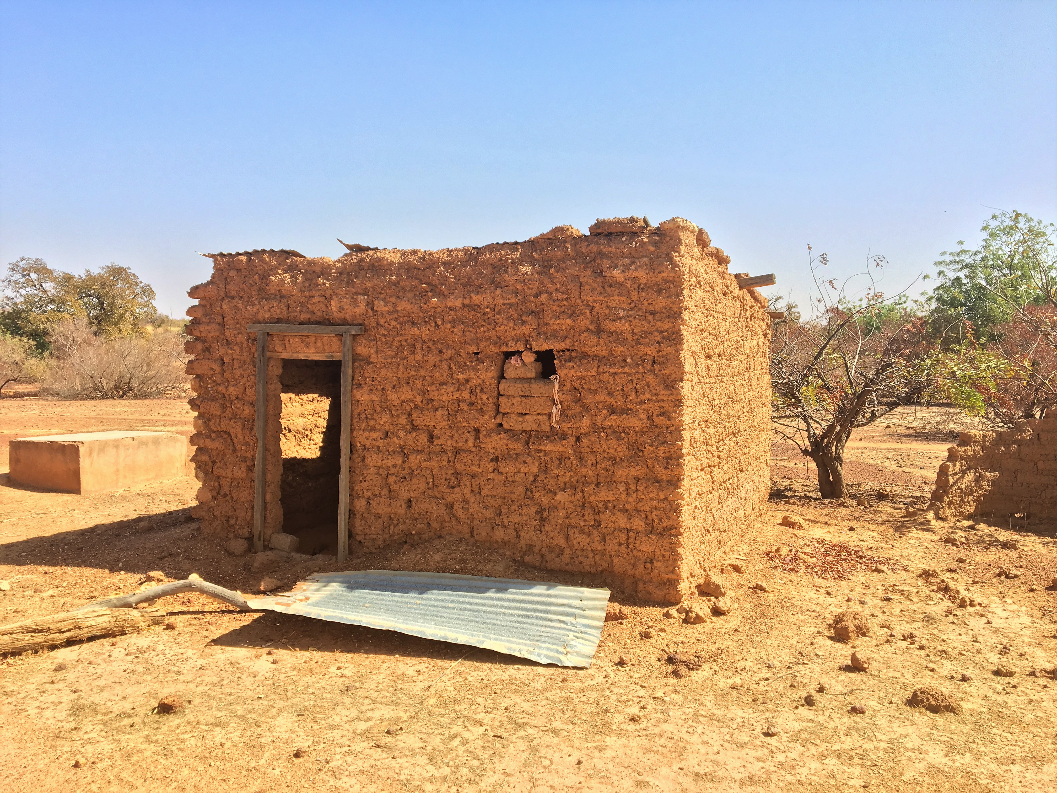 Poste de Santé Primaire de Ouazellé, en ruine